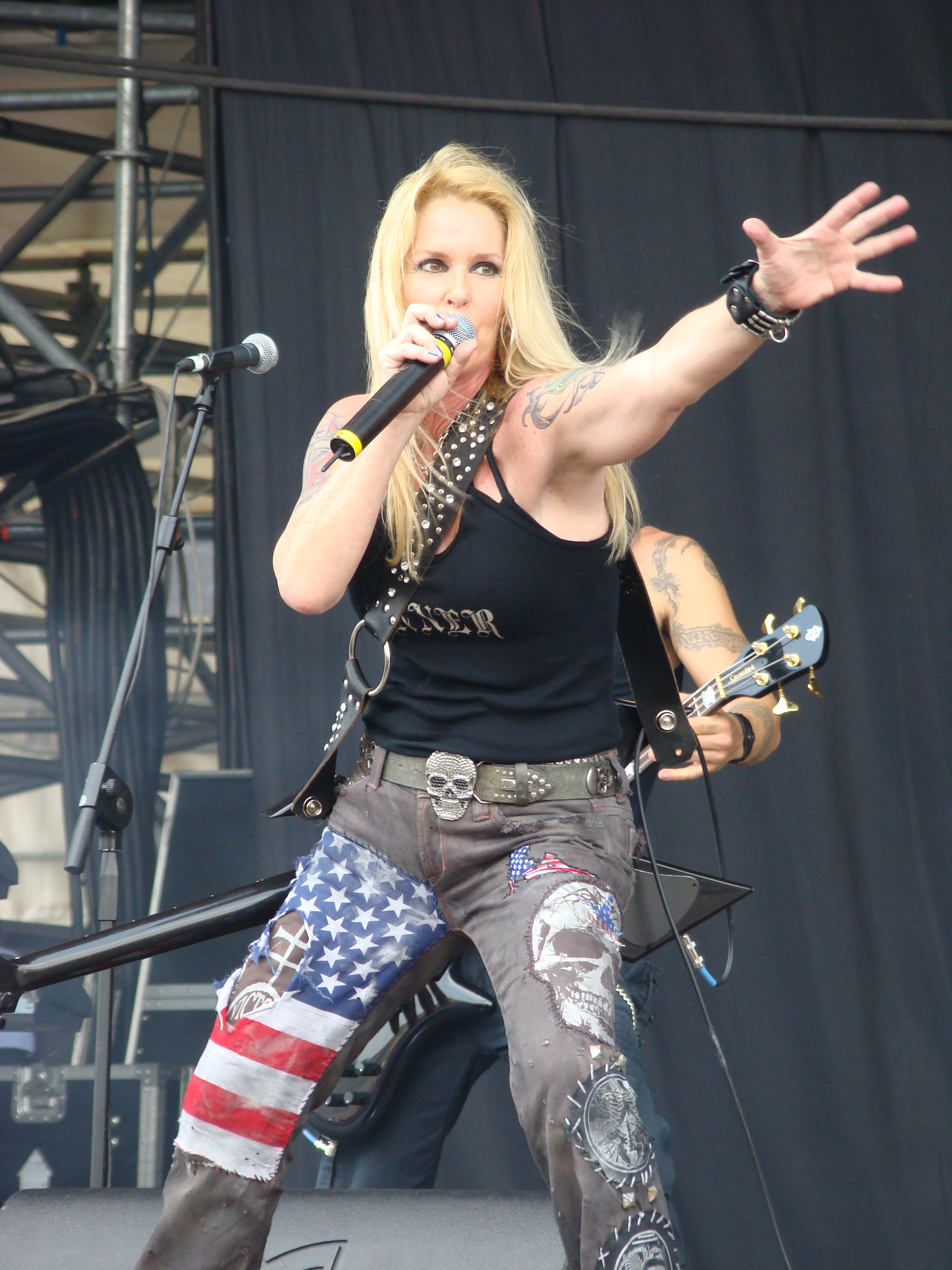 Emiliàn e rumagnòl: La Lita Ford dal Viṿ durànt la prima giurnàda dal Gods of Metal dal 2009